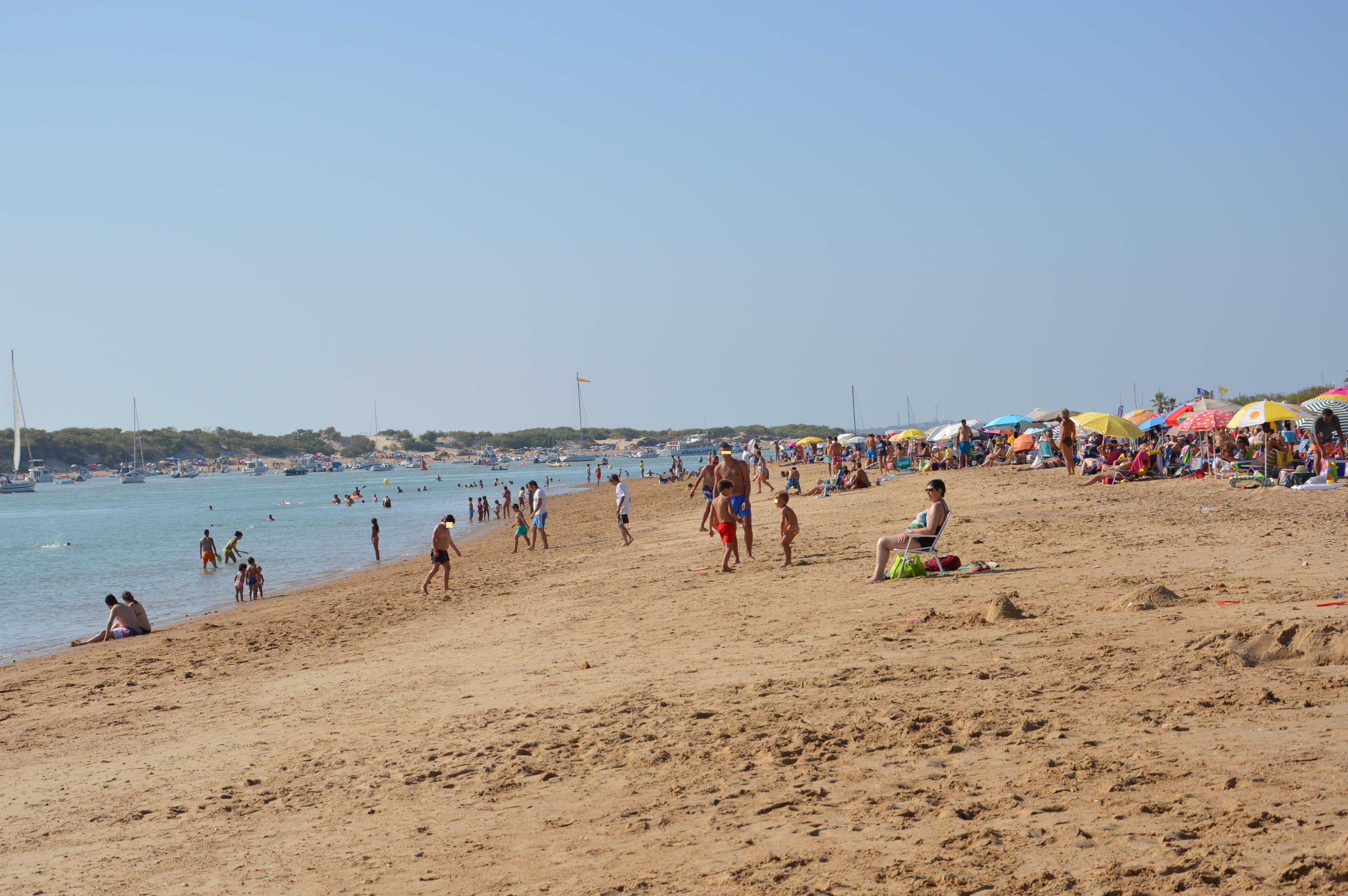 Vista de la Playa de Sancti Petri en julio de 2013